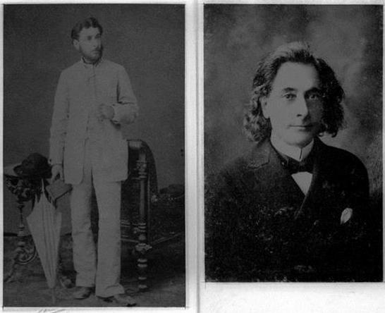 אימבר נפתלי הרץ